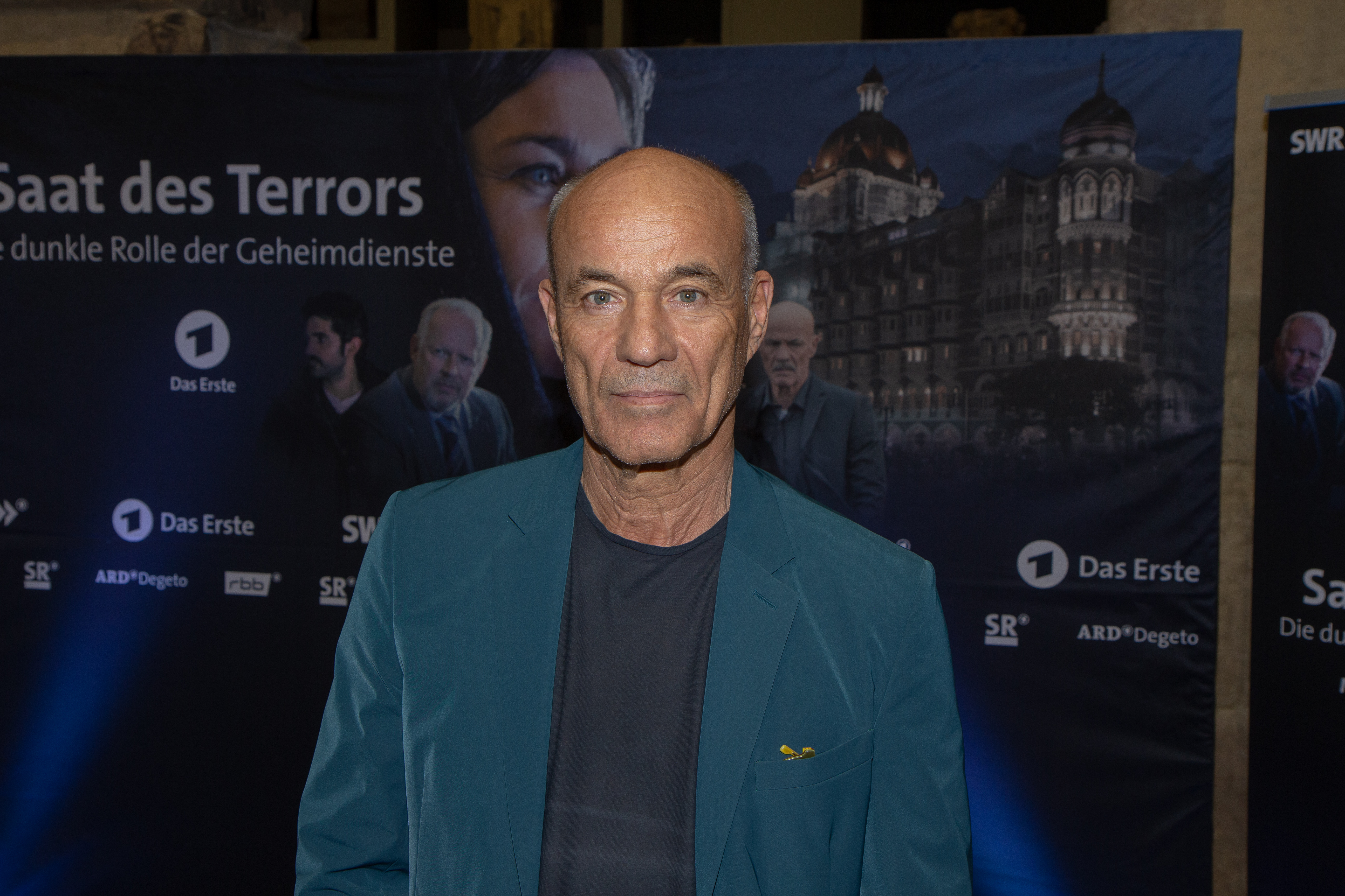 Preview SWR Film „Saat des Terrors" über die dunkle Seite der Geheimdienste: Filmvorführung im Landtag Rheinland-Pfalz, Plenarsaal u.a. mit Daniel Harrich, Hauptdarsteller Heiner Lauterbach sowie den SWR-Redakteuren Manfred Hattendorf und Thomas Reutter.